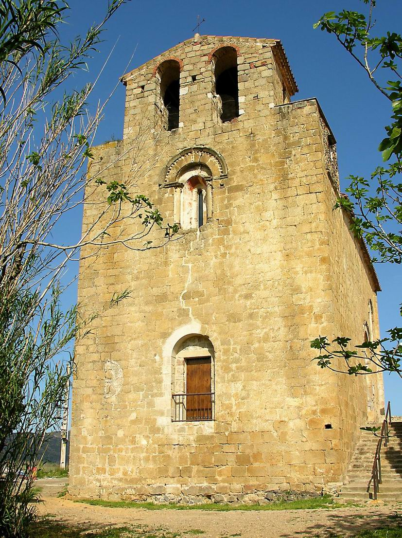 Església de Sant Esteve de Pedret, a Pedret i Marzà